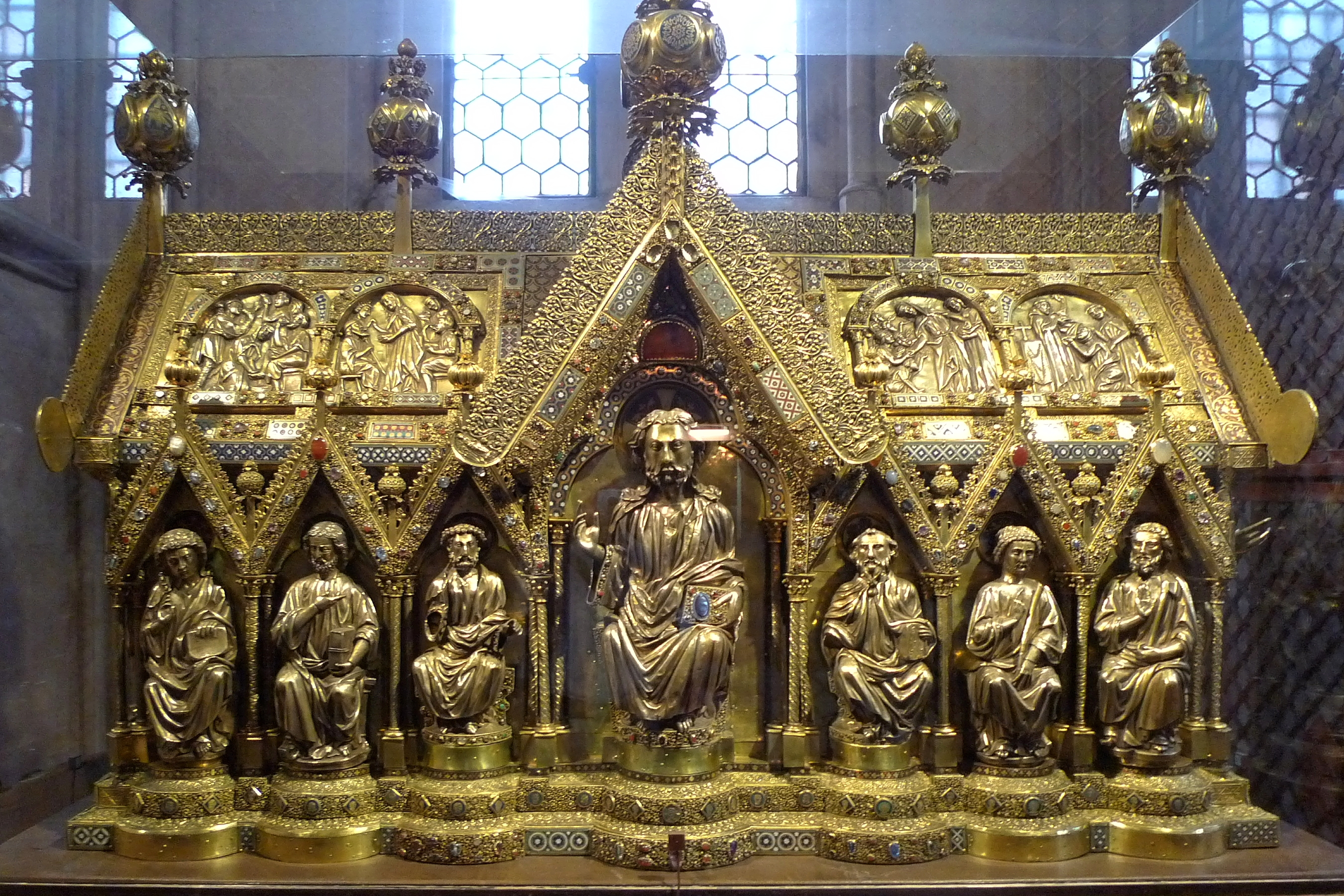 Elisabethkirche Marburg, Schrein der Elisabeth